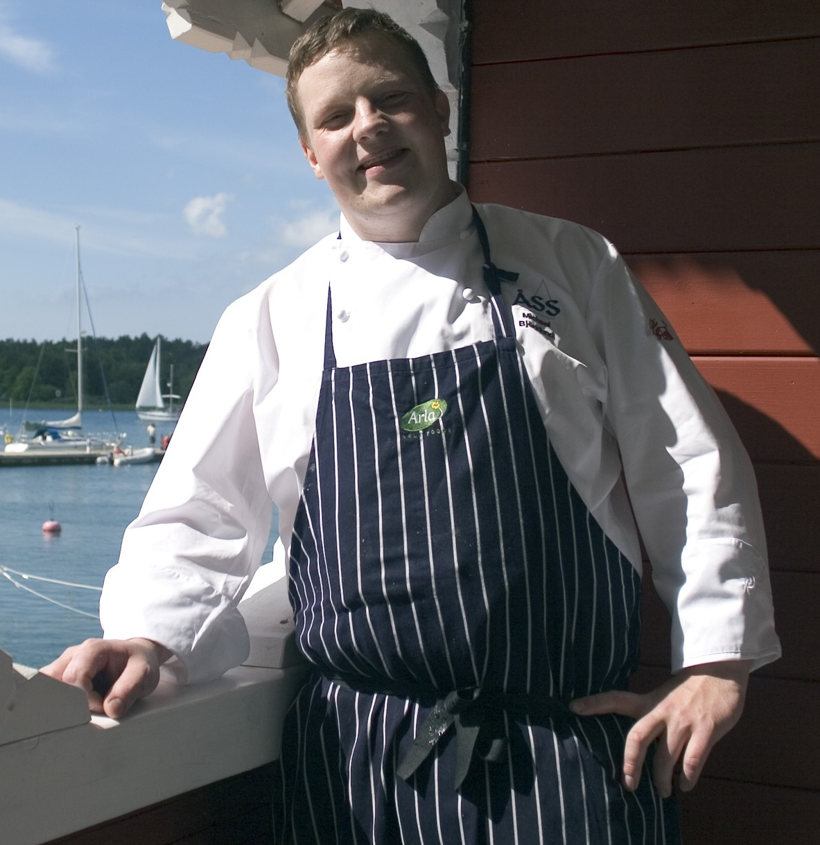 Ny Nordisk Mat-ambassadören Michael Björklund från Åland